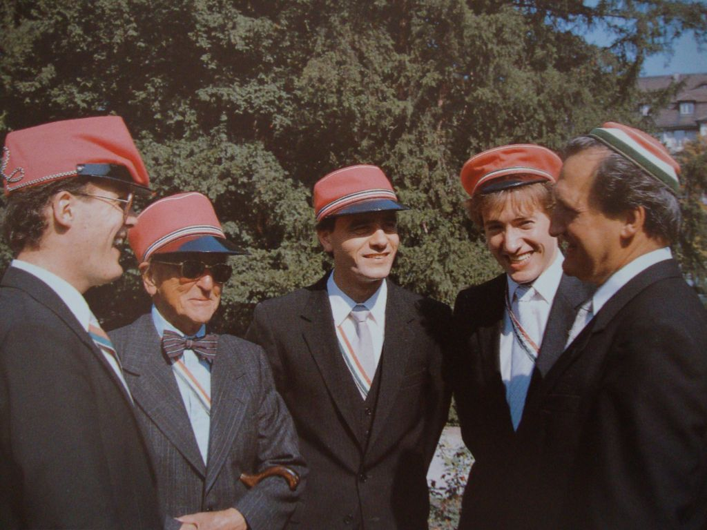 Die verschiedenen Kopfbedeckungen der AKV Kyburger: (v.l.n.r.) Stürmer, Cadorna-Mütze, Biedermeier, Tellermütze, Biertönnchen